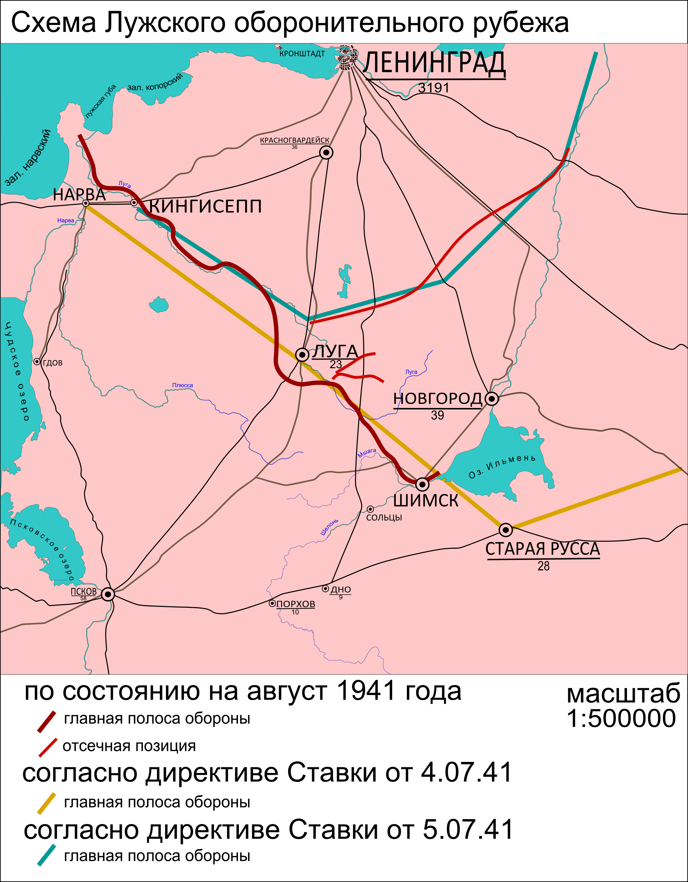 Схема расположения Лужского оборонительного рубежа в августе 1941 года